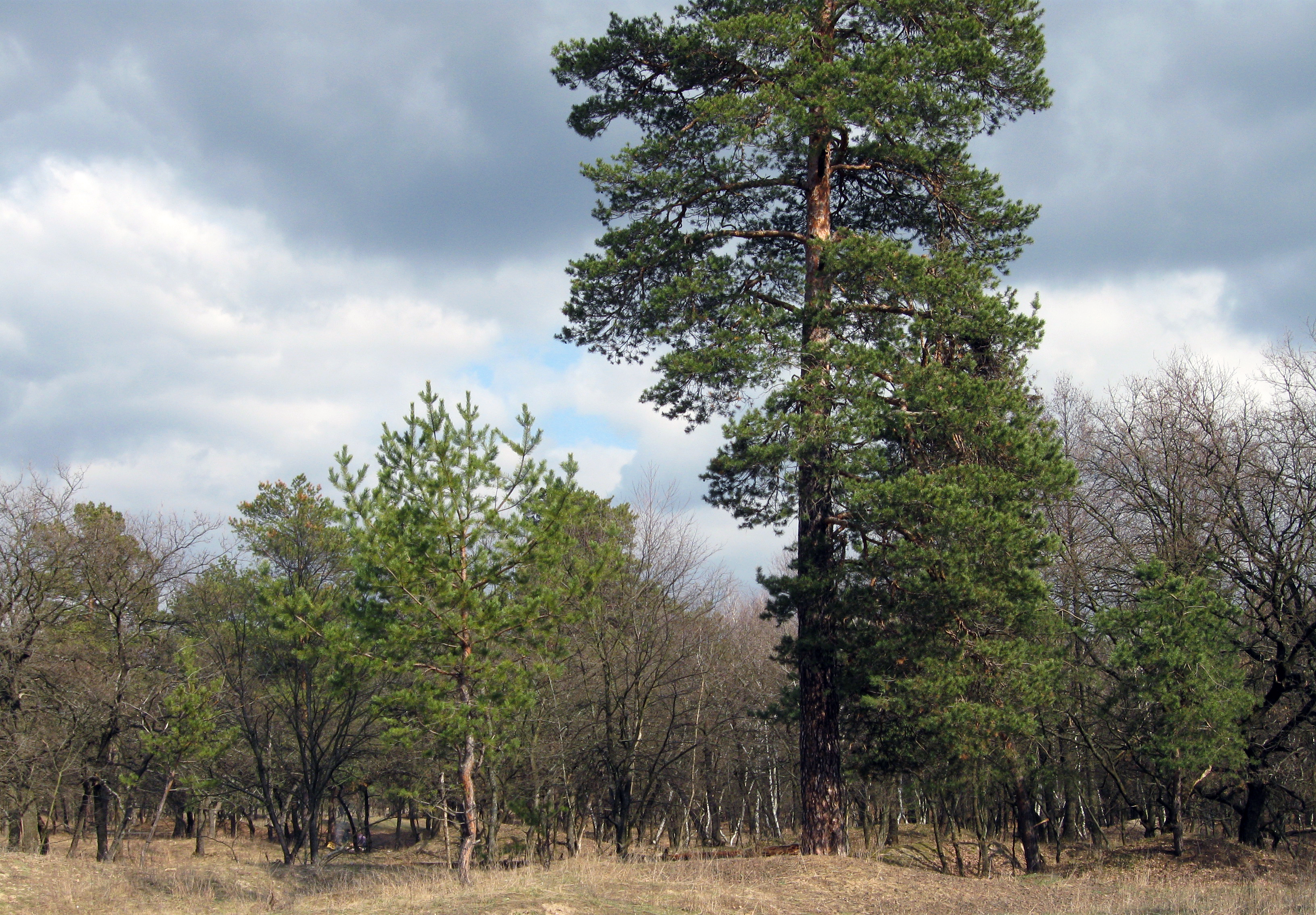 Опушка Самарского леса